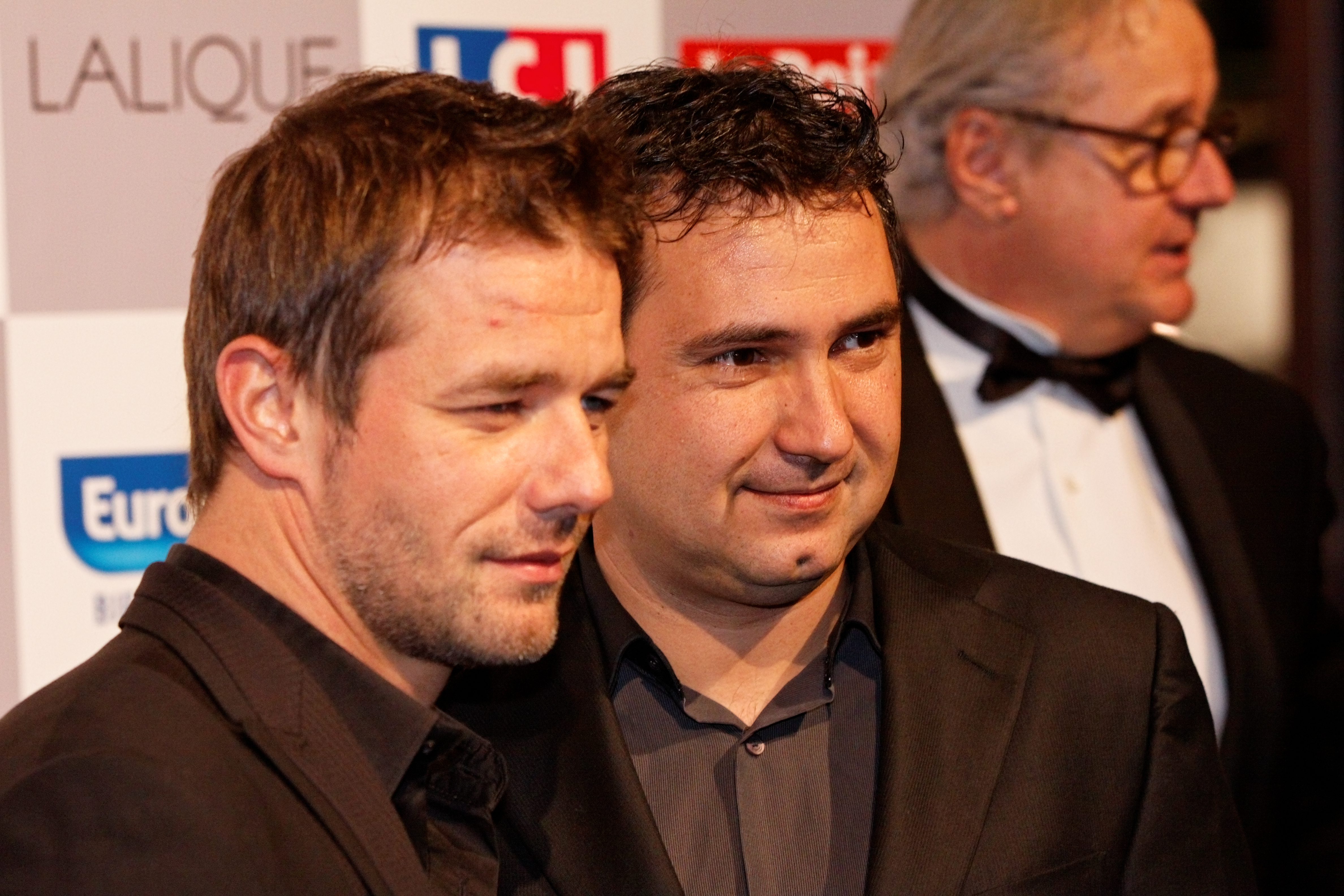 Sébastien Loeb et Daniel Elena lors du photocall du festival automobile international 2012